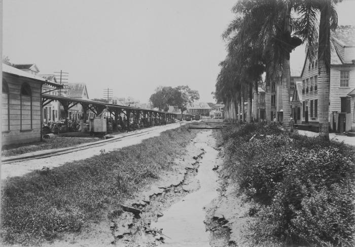 foto. De Lawaspoorweg tussen de Heiligenweg en de overdekte markt